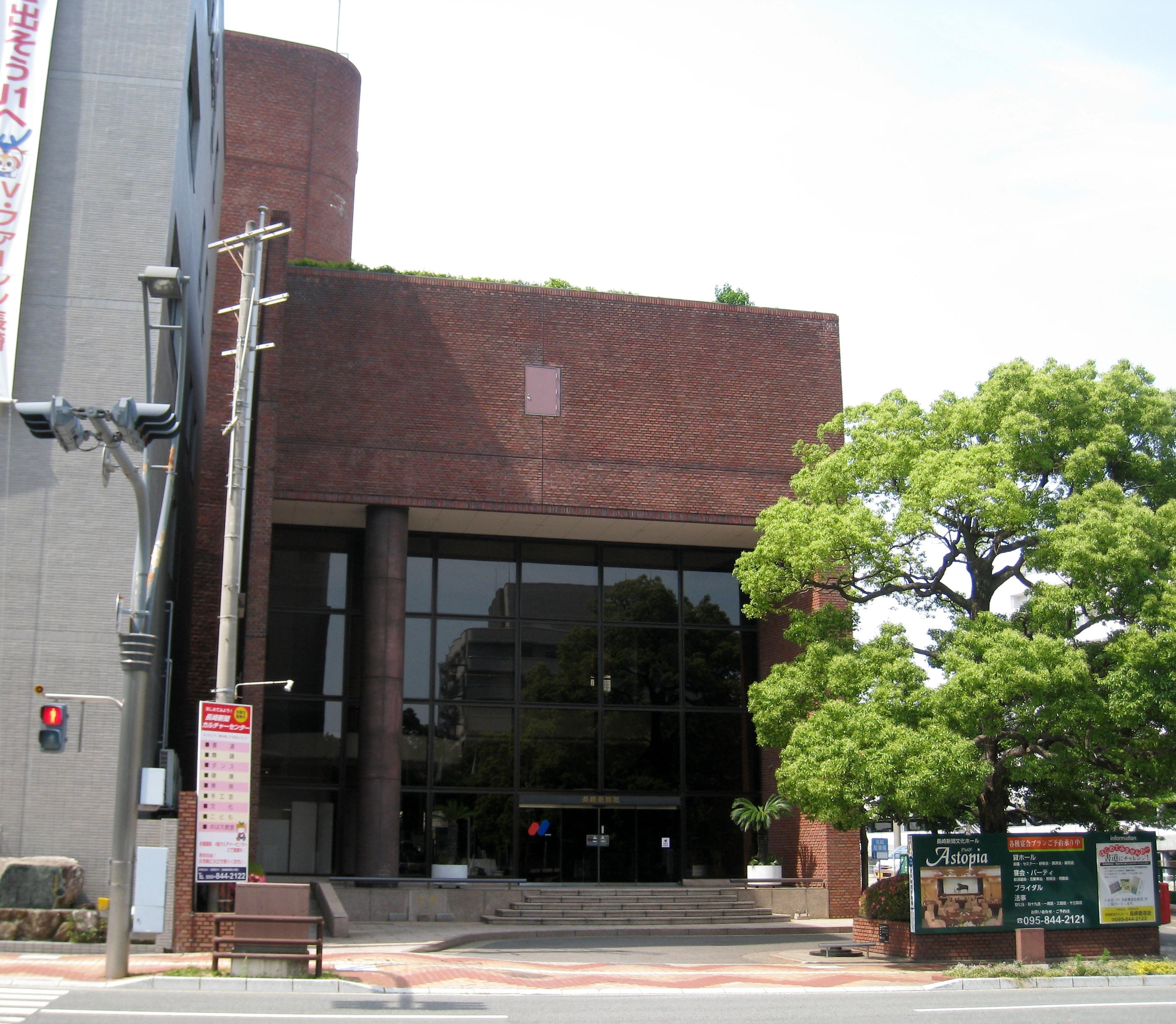 長崎新聞本社ビル